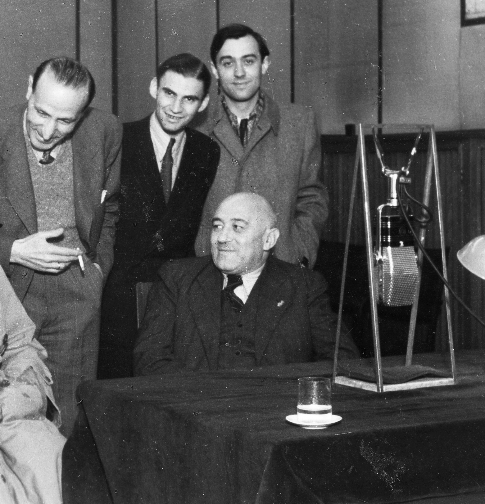 Rákosi Mátyás a Magyar Rádió stúdiójában. Location: Hungary, Budapest VIII. Tags: Hungarian Radio, microphone, Budapest Title: Rákosi Mátyás a Magyar Rádió stúdiójában.